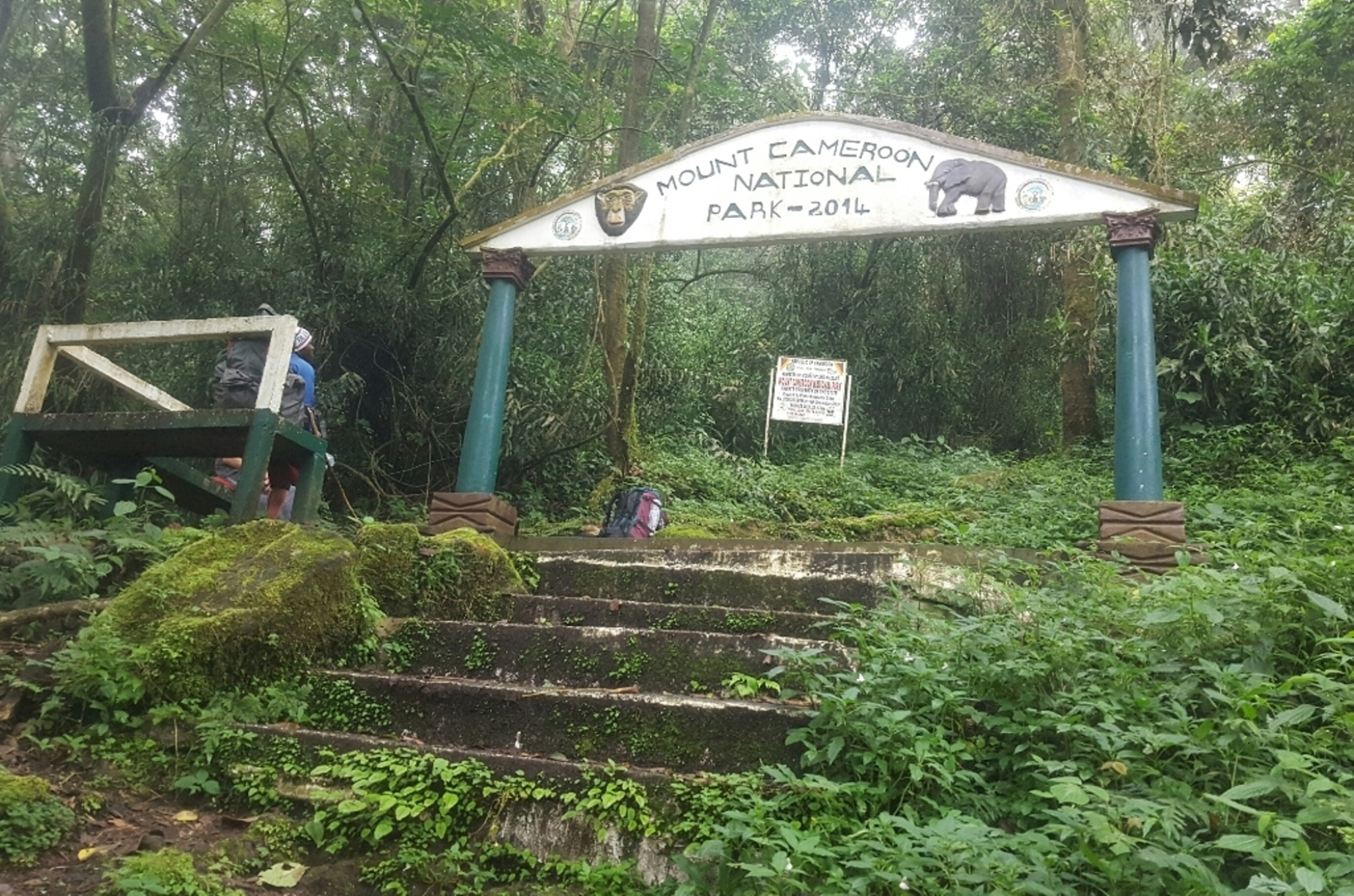 Entrance to the Mt Cameroon National park situated in Buea, south west region